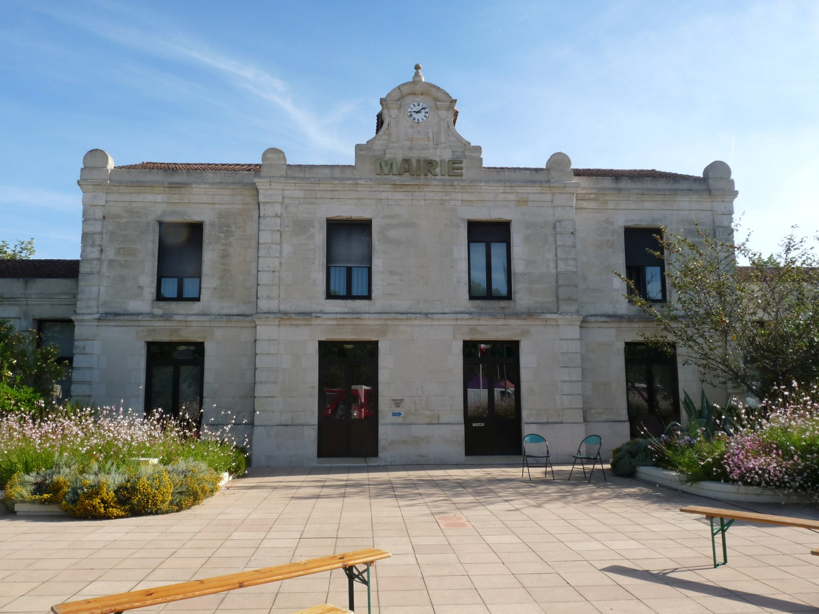 Mairie de St-Seurin-sur-l'Isle, Gironde, France